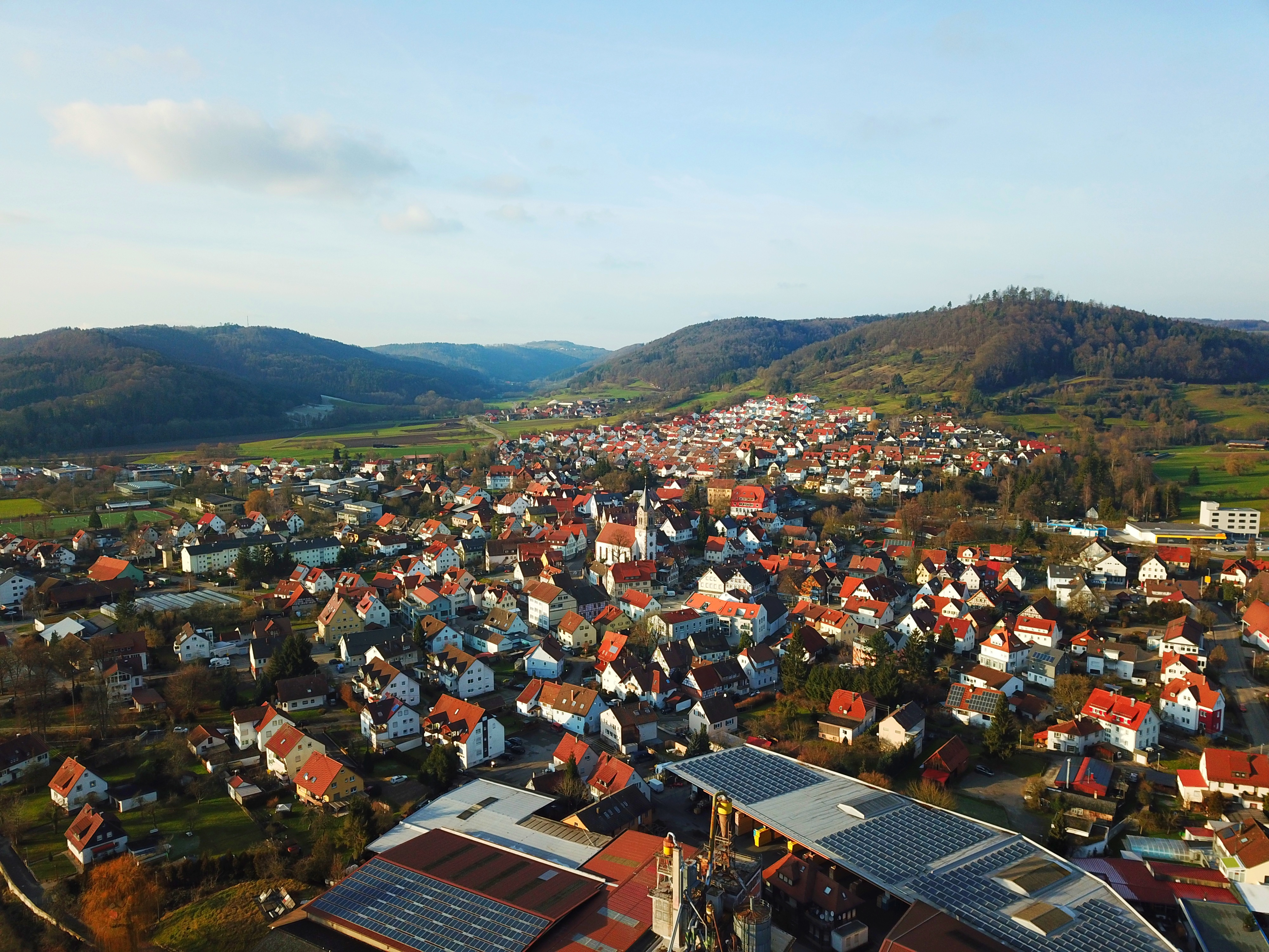 Blick auf Sulzbach an der Murr von Südosten. Im Hintergrund das Untertal der Spiegelberger Lauterl